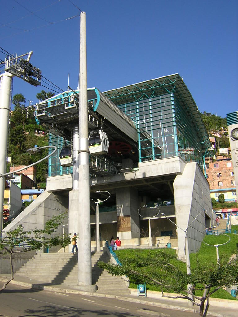 Metro de Medellín, Estación Santo Domingo Savio. Medellín, Colombia.